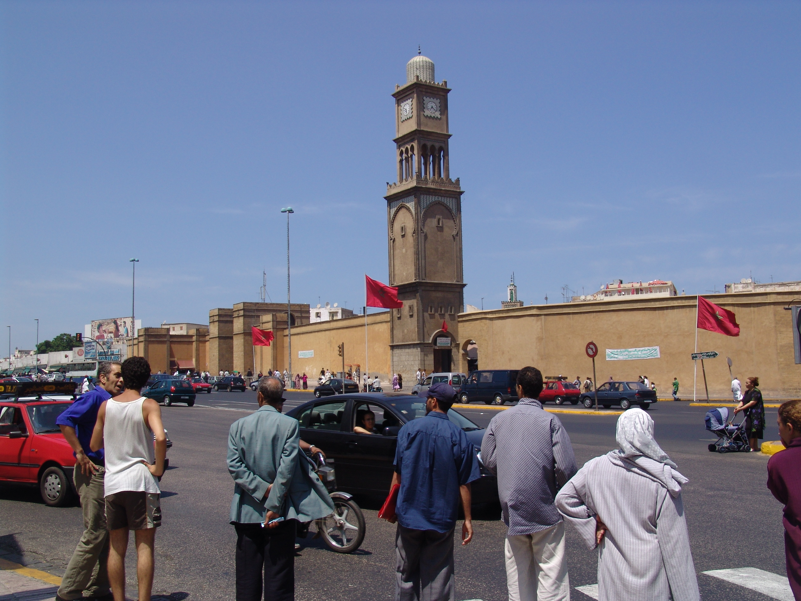 Uhrturm am Place des Nations-Unies, Casablanca